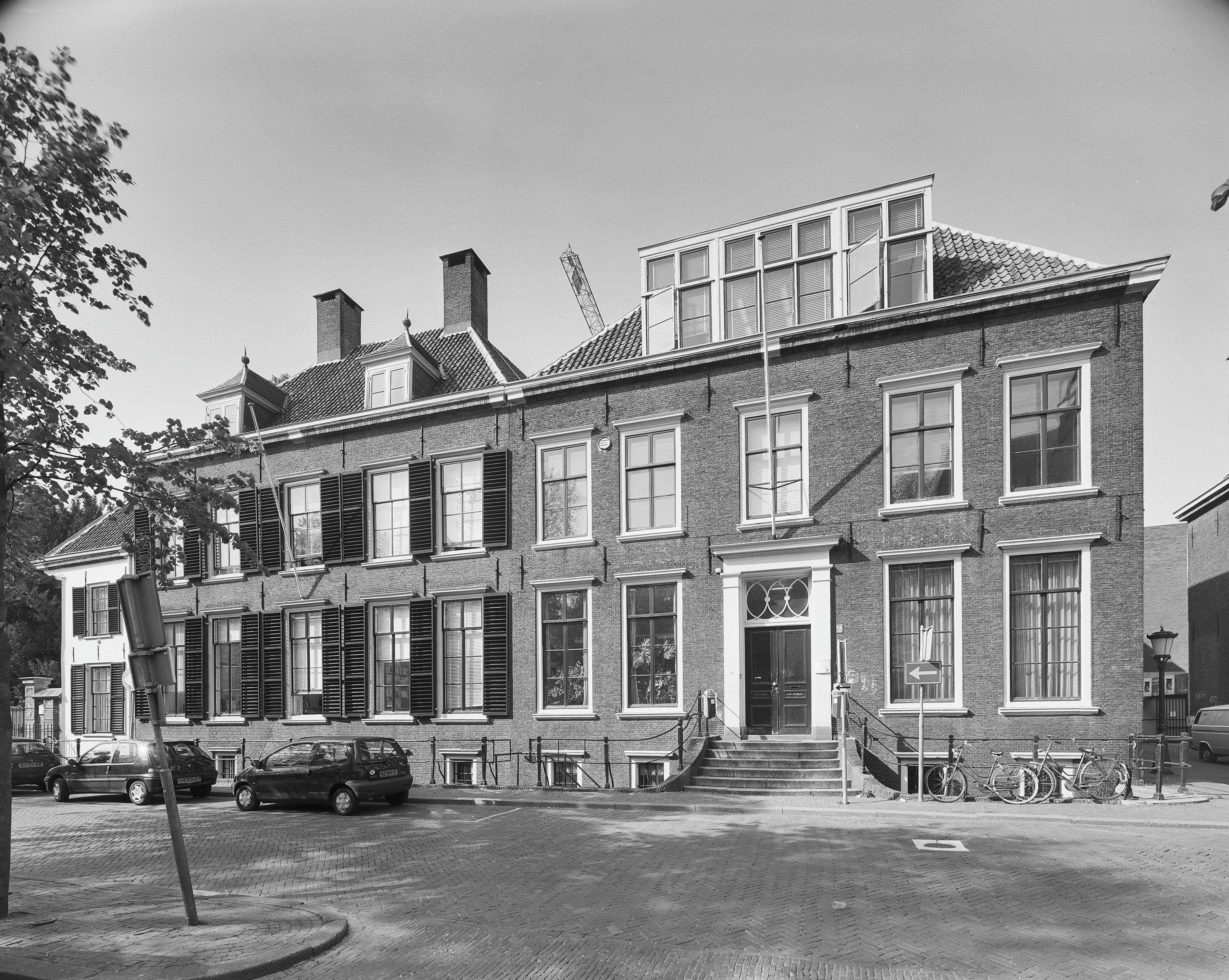 Herenhuis: Overzicht voorgevels herenhuizen (opmerking: Gefotografeerd voor Huizen in Nederland, Hendrick de Keyser)